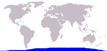 Bewerking afbeelding: Afbeelding_(kaart).JPG